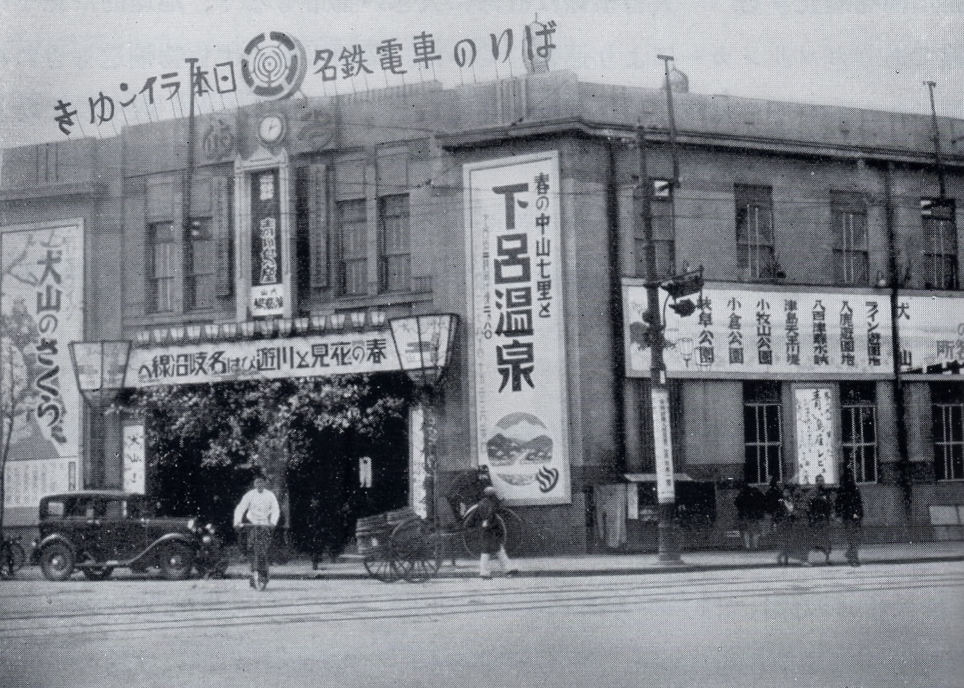 昭和8年ごろの柳橋駅